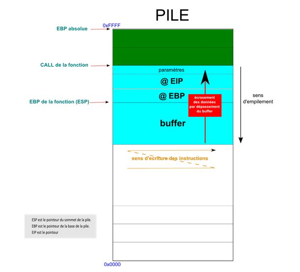 Schéma explicatif du depassement de tampon